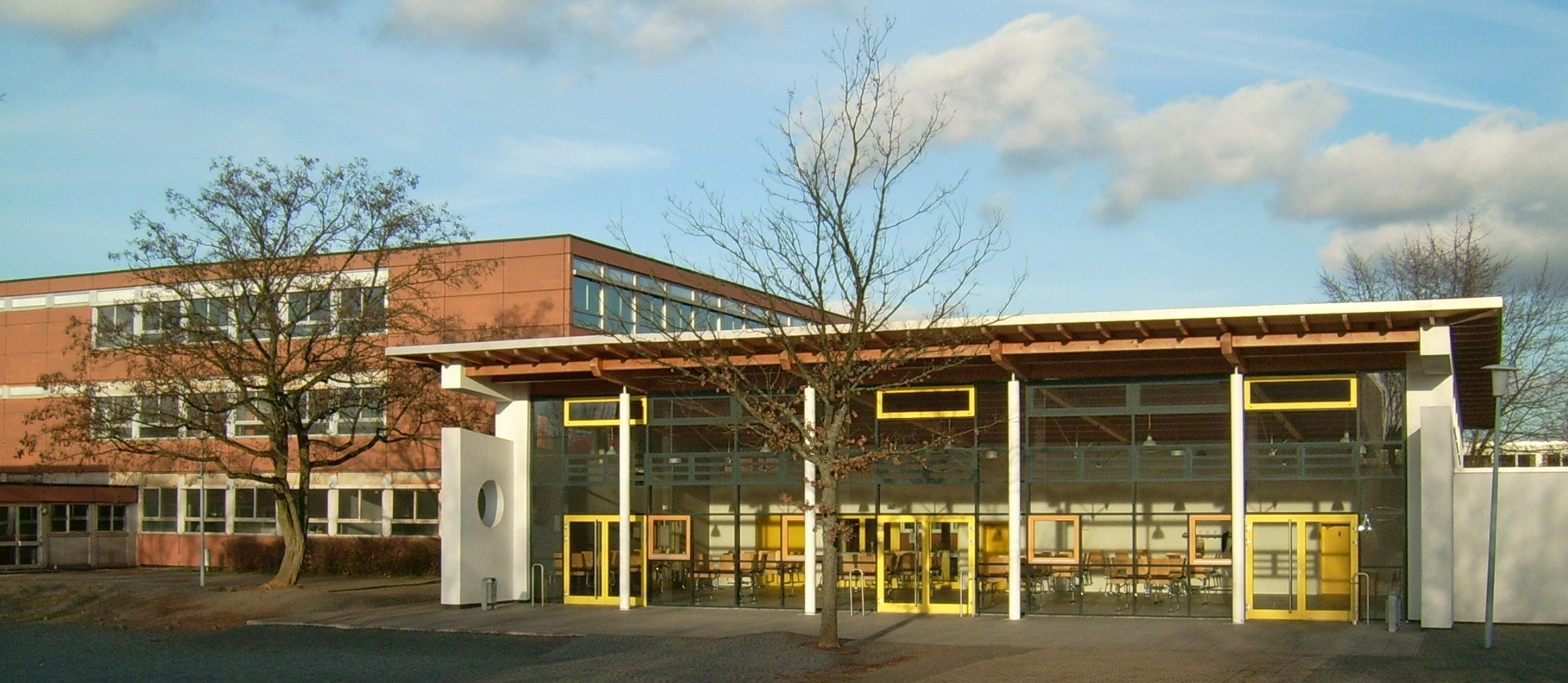 Illtal-Gymnasium in Illingen, Saarland/ Deutschland.